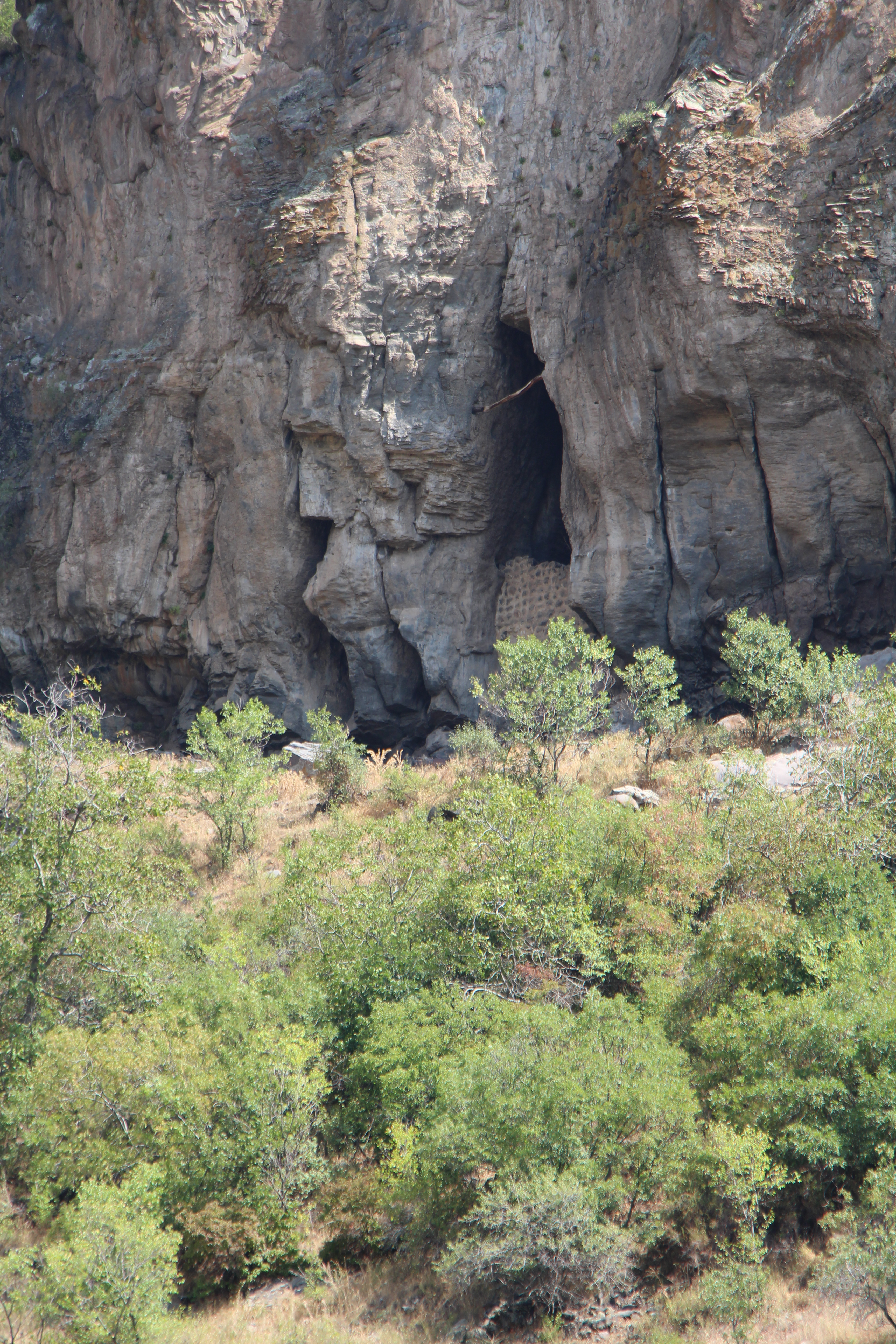 Օրգով, Արագածոտնի մարզ, ՔԱՐԱՅՐ - ԿԱՑԱՐԱՆ «ՃԳՆԱՎՈՐԻ ԱՅՐ», 13-14 դդ., 2 կմ հվ, Ամբերդի ձորում, «Ղազարի ձոր» գյուղատեղիի դիմաց 114/16